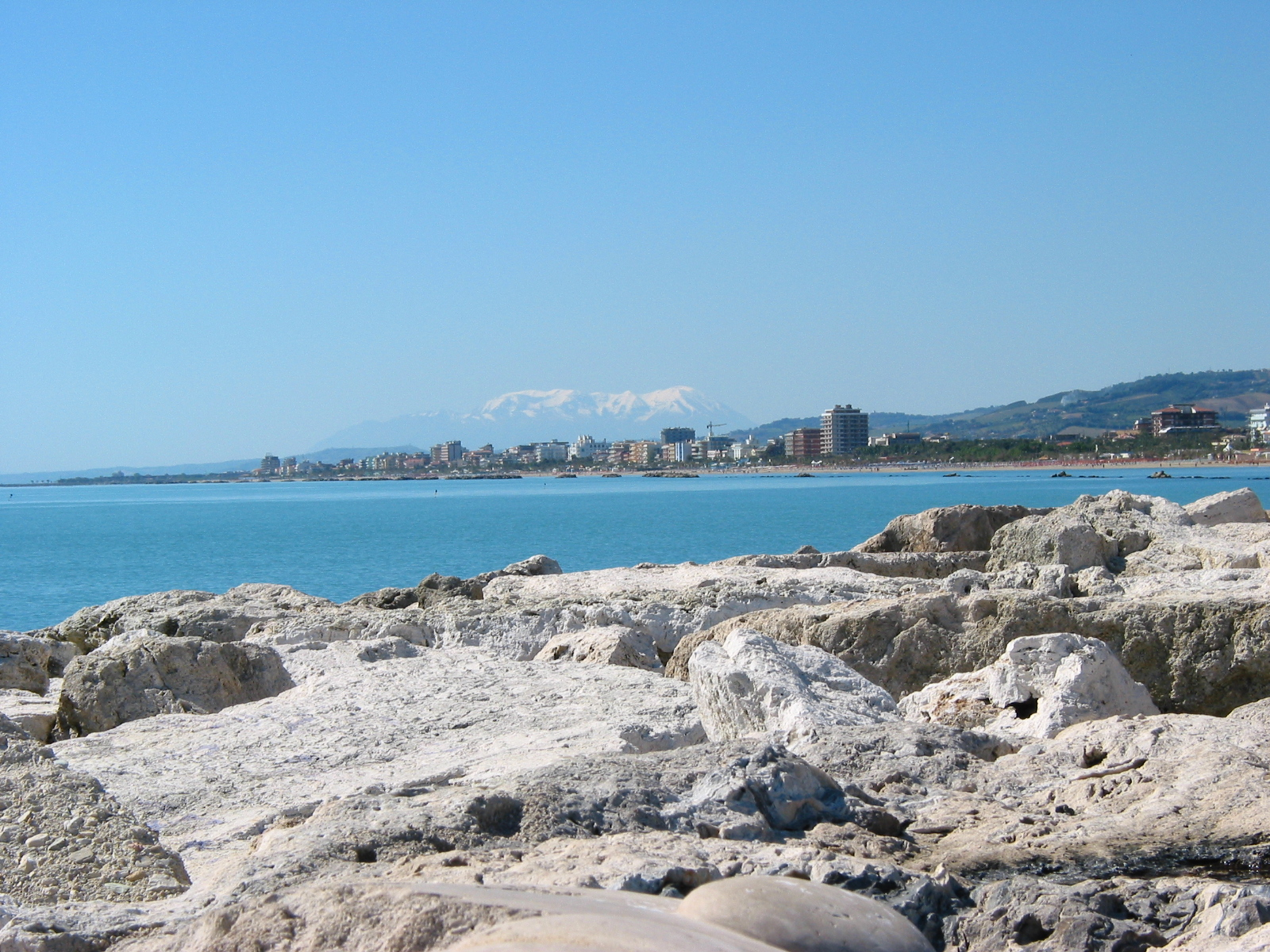 San Benedetto del Tronto. Vista di Porto d'Ascoli con la Maiella sullo sfondo.